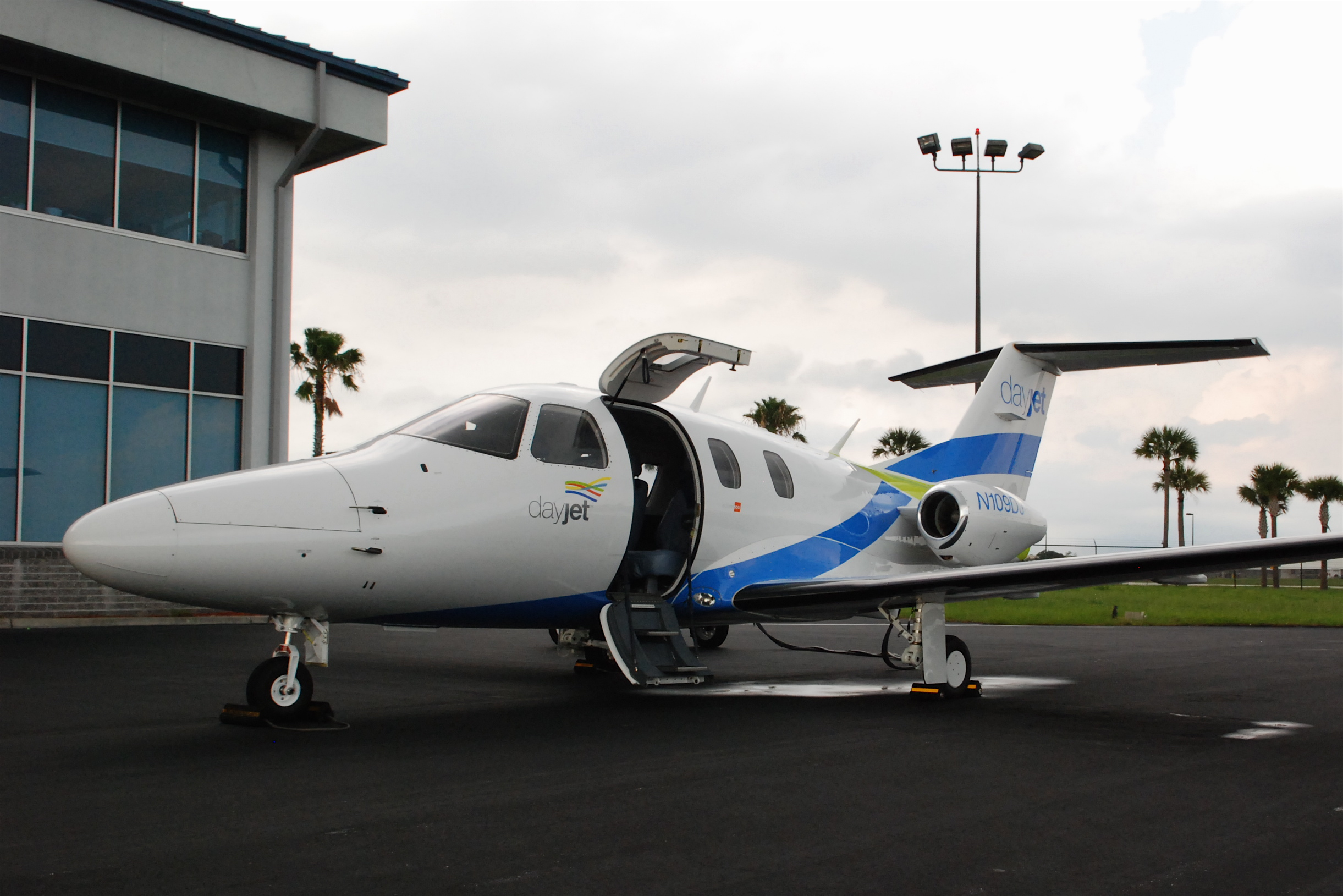 See blog post for review